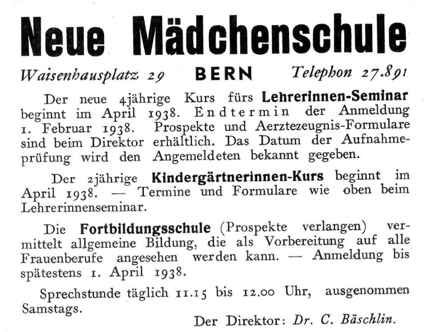 1938, Neue Mädchenschule Bern am Waisenplatz 29